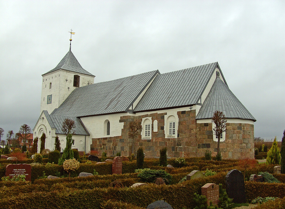 fra sydøst